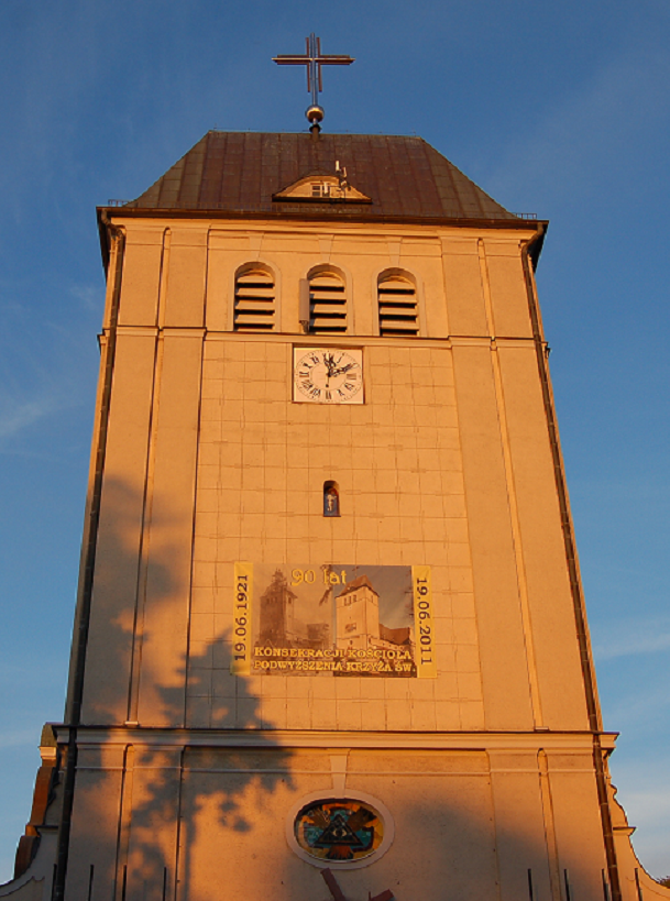 Wieża kościoła św. Krzyża w Rumi